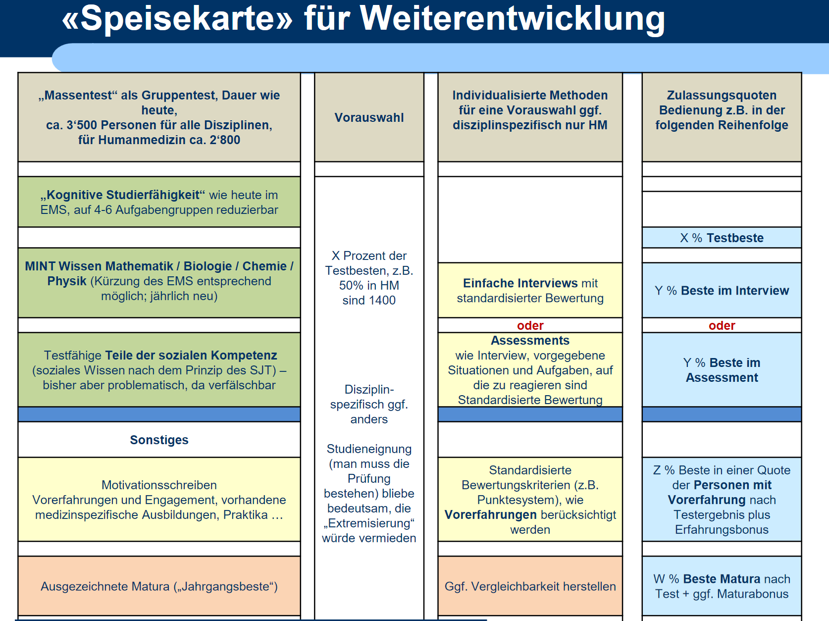 Zulassung Medizinstudium Schweiz: Optionen für eine Weiterentwicklung